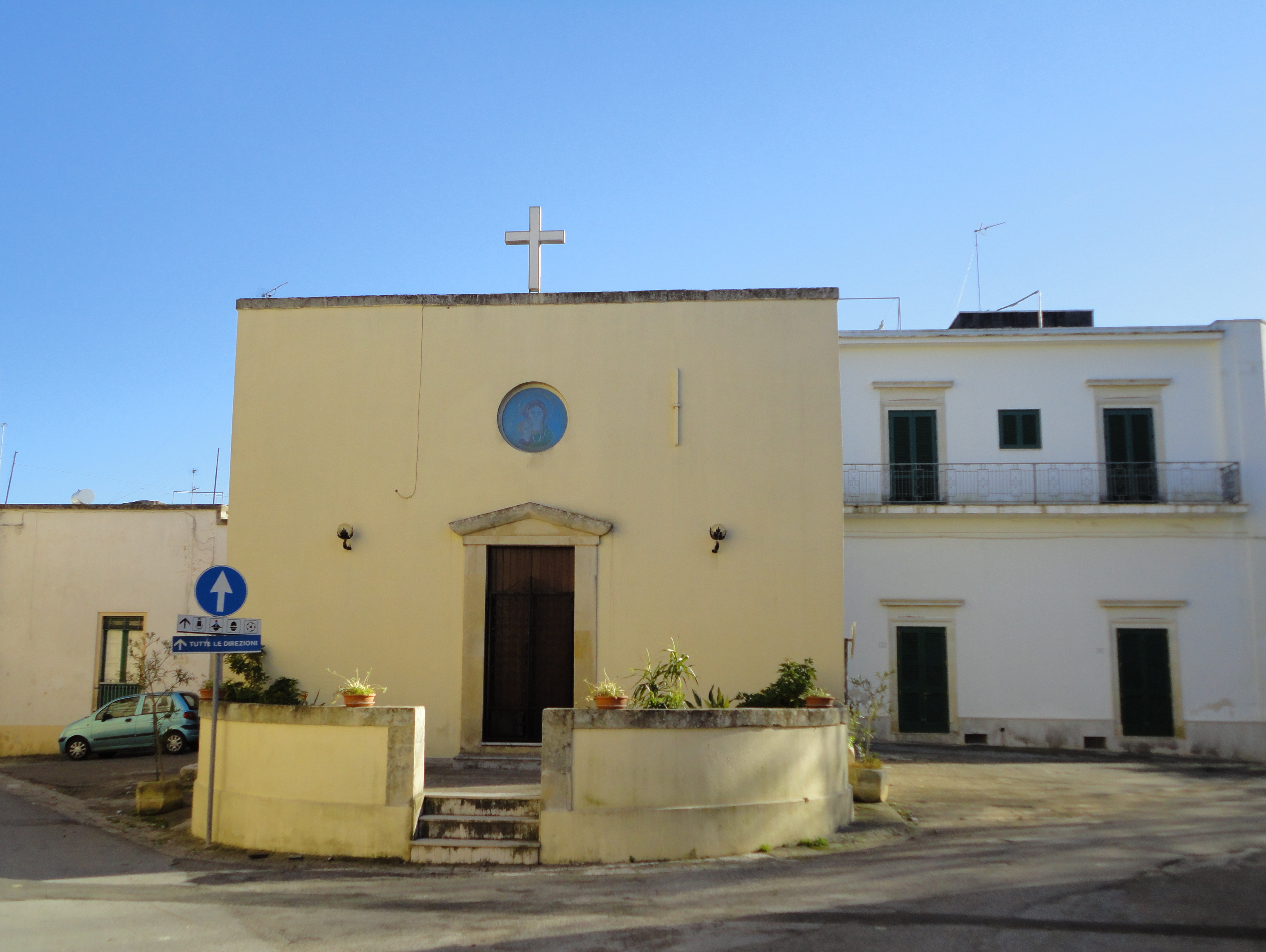 Spongano Chiesa Madonna del Rosario, Lecce